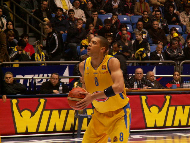 אנתוני פארקר